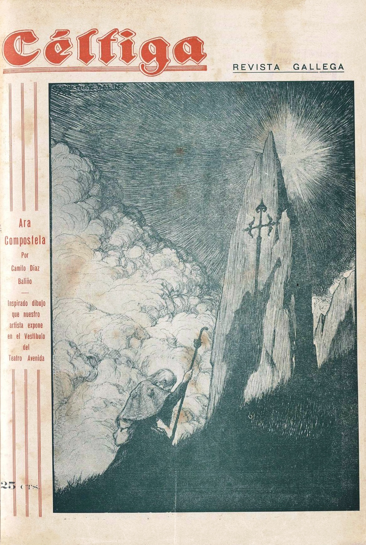 Ara Compostela por Camilo Díaz Baliño, inspirado dibujo que nuestro artista expone en el Vestíbulo del Teatro Avenida. Céltiga n.º 151, Buenos Aires, 10 de abril de 1931, portada